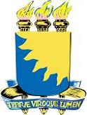 Brasão UEPB